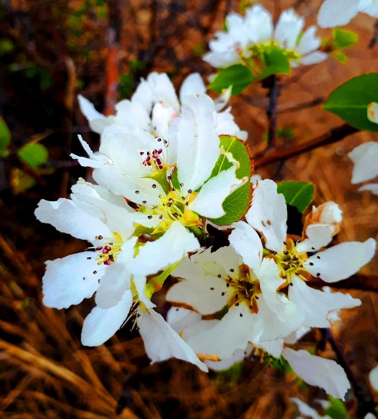 Pear Blossom in Eastern Siberia